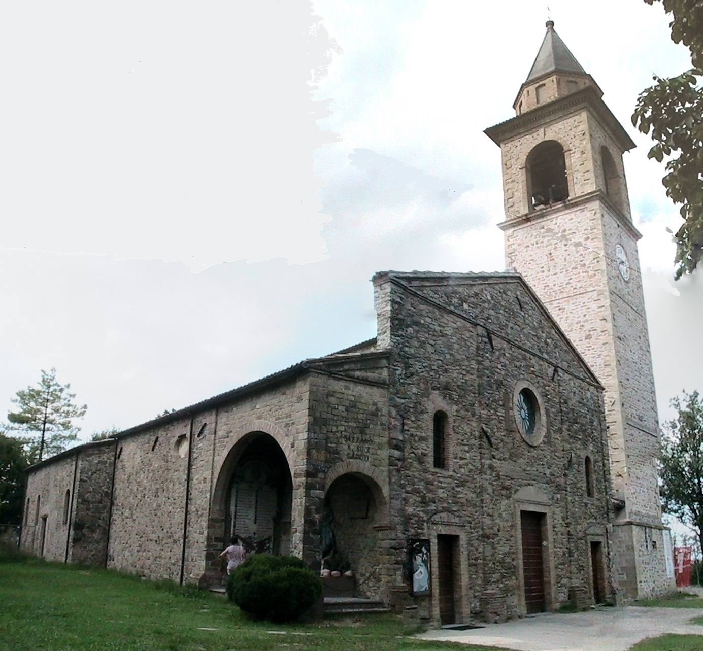 Bazzano (Neviano degli Arduini) - Pieve romanica di Sant'Ambrogio